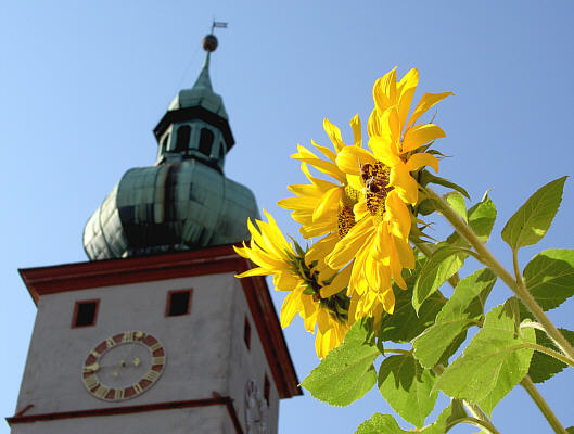 Stadtpfarrkirche Fotograf: Walter J. Pilsak, Waldsassen Copyright Status: GNU Freie Dokumentationslizenz Afbeelding:Tir-3.jpg